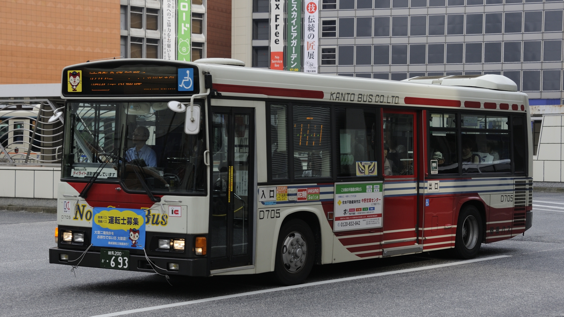 関東バスD705号車